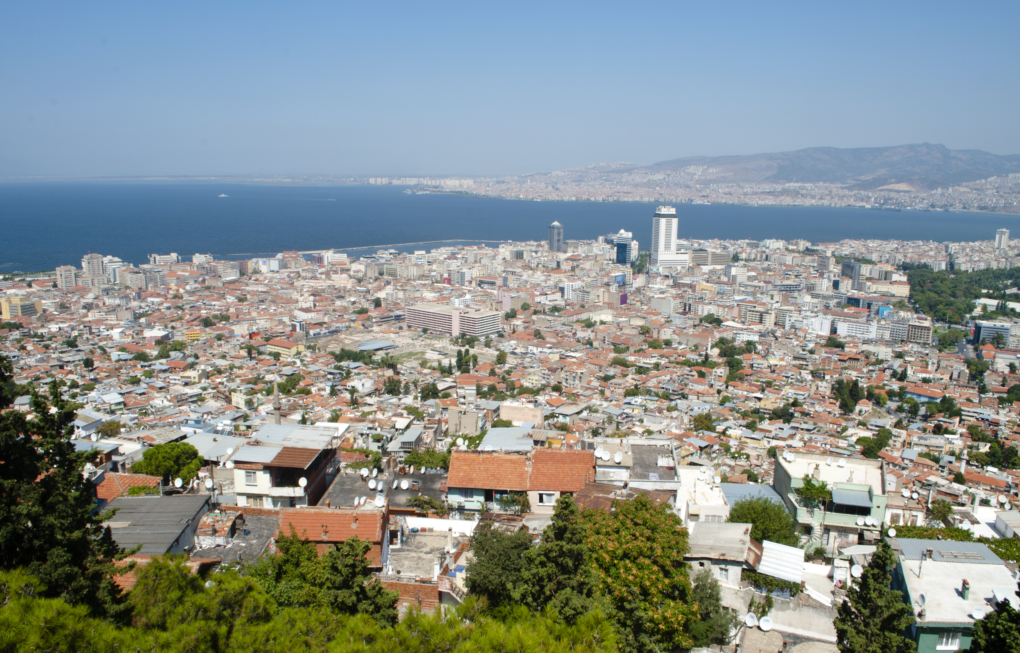 Kadifikale, Izmir, Turquia, agosto/2014. (Foto: Rafaela Ely)